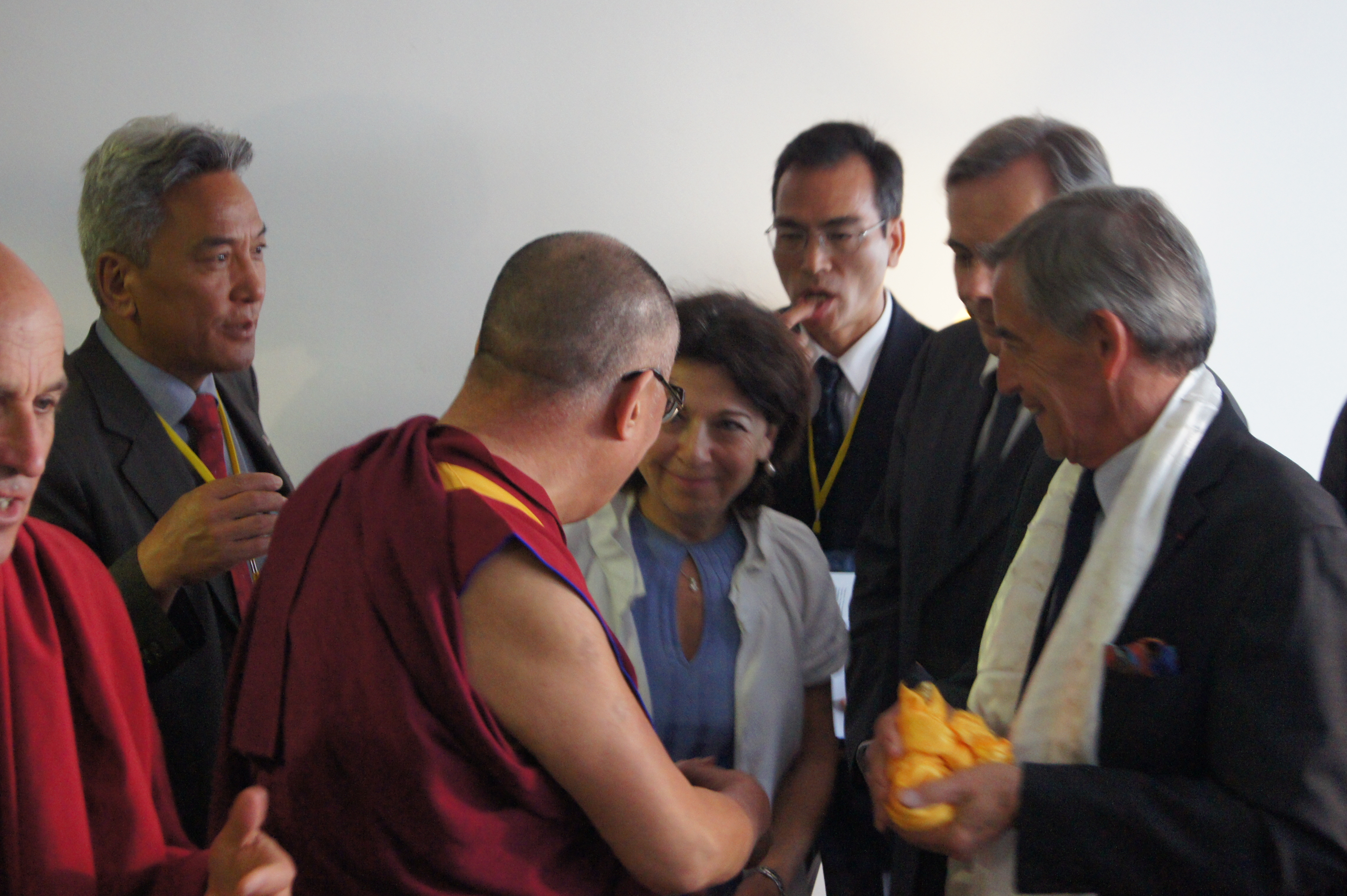 Rencontre des parlementaires avec sa sainteté le Dalaï Lama à Toulouse le 15 août 2011